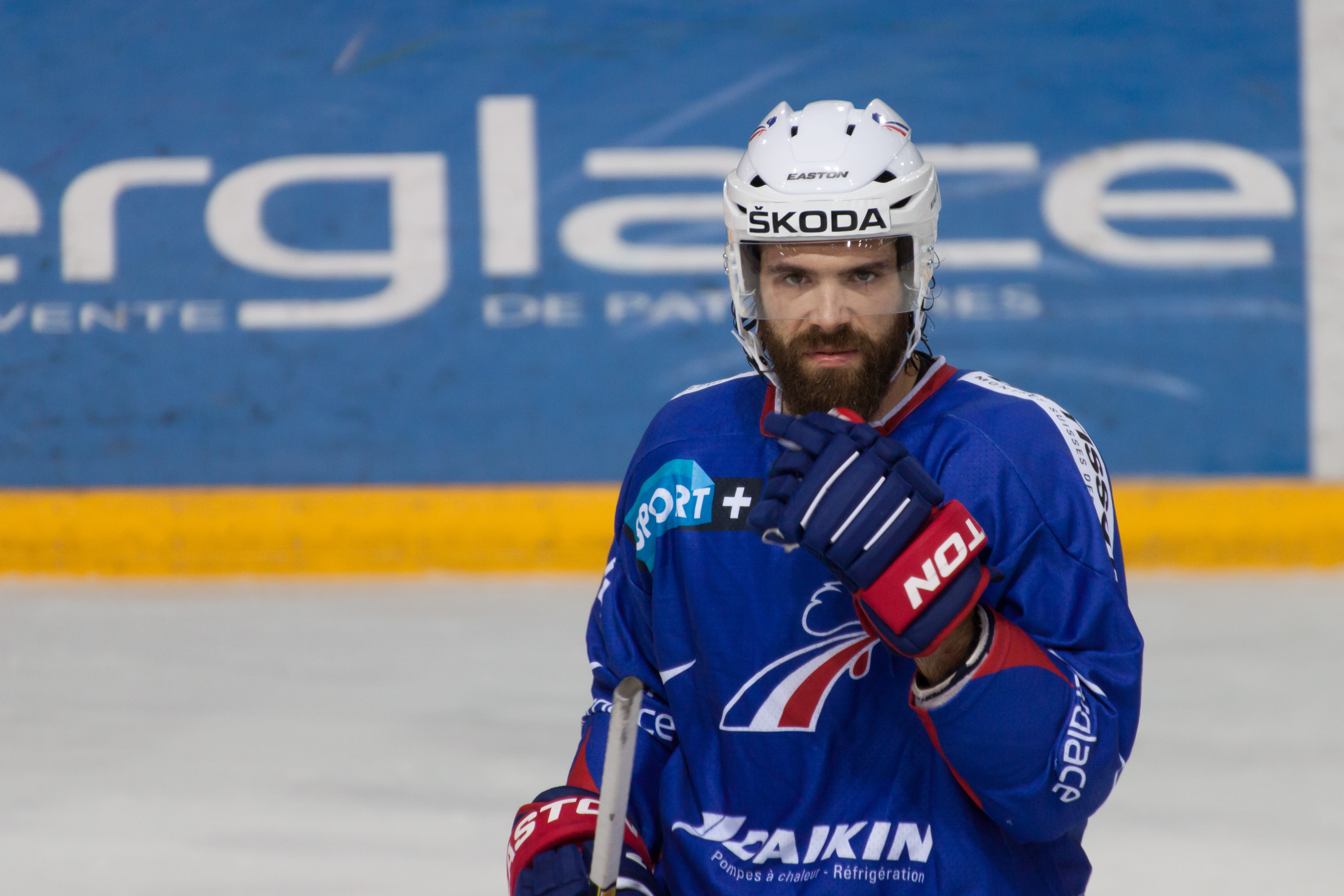 Antonin Manavian lors du match France - Norvège à la Patinoire Pole Sud (Grenoble)